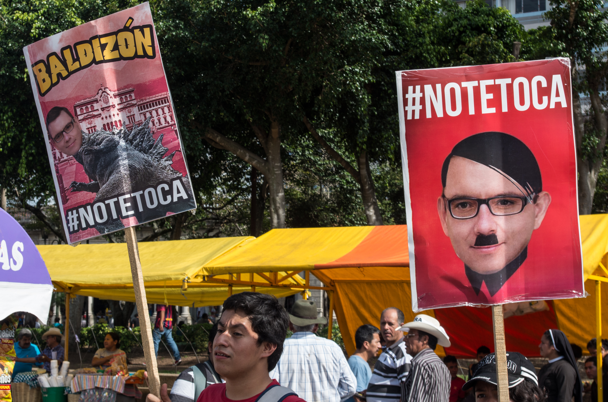 Manifestation citoyenne au Guatemala contre la corruption et pour demander la démission du gouvernement.